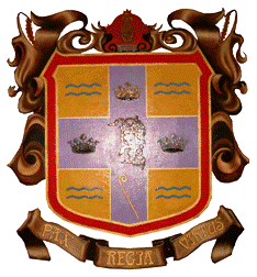 escudo Ecuandureo